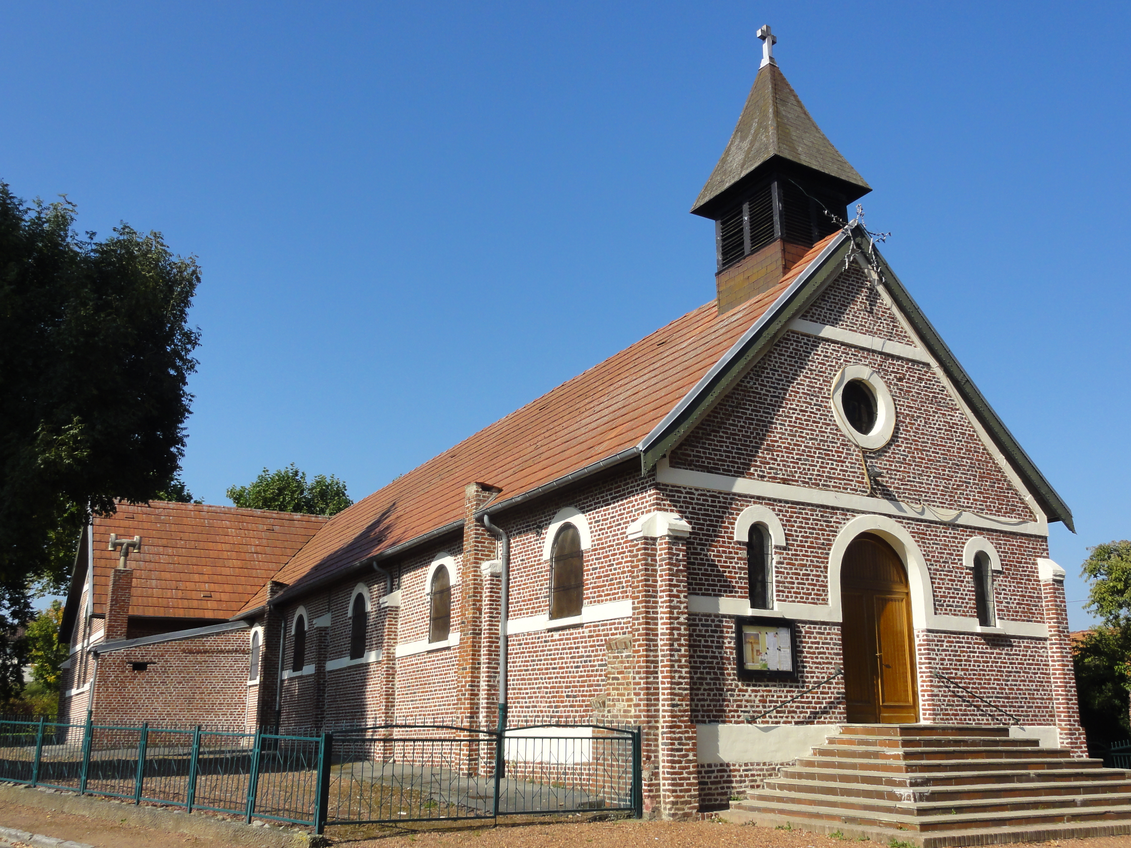 Église Saint-Stanislas, cités des fosses nos 2 et 2 bis - 2 ter de la Compagnie des mines de Marles dans le bassin minier du Nord-Pas-de-Calais, Calonne-Ricouart, Pas-de-Calais, Nord-Pas-de-Calais, France.